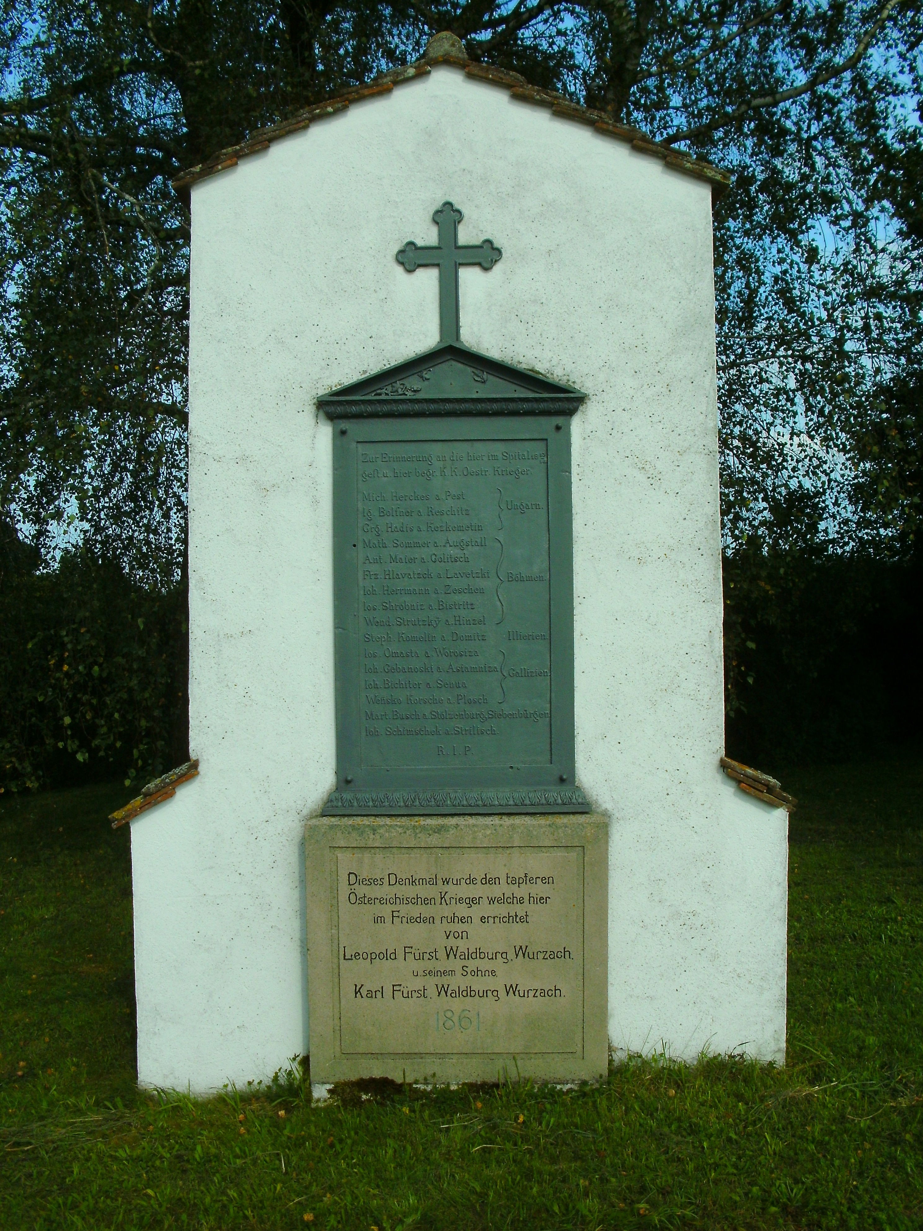 Leprosenhaus Denkmal tapfere österreichische Krieger - Koalitionskrieg 1813/14